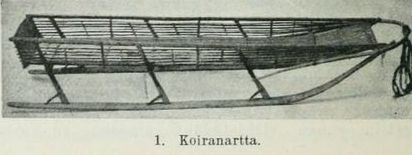 Venäjän pohjoisten kansojen reki nartta eli sani; tämä on koirareki